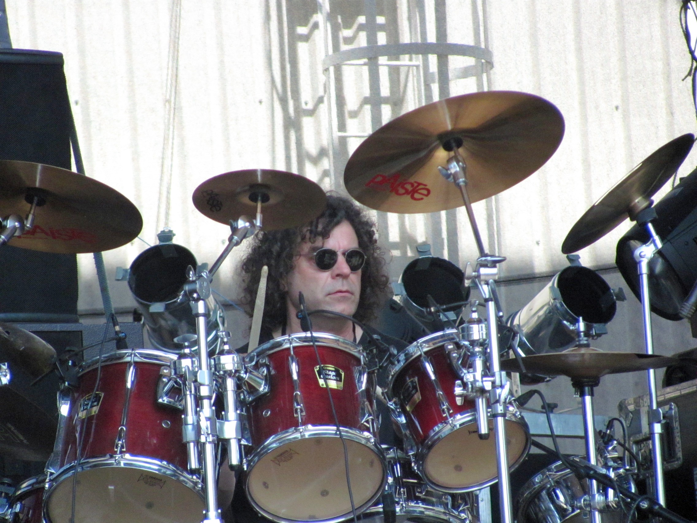 Jiří Pátek, Visací zámek, Ronnie James Dio stage, Masters of Rock 2010